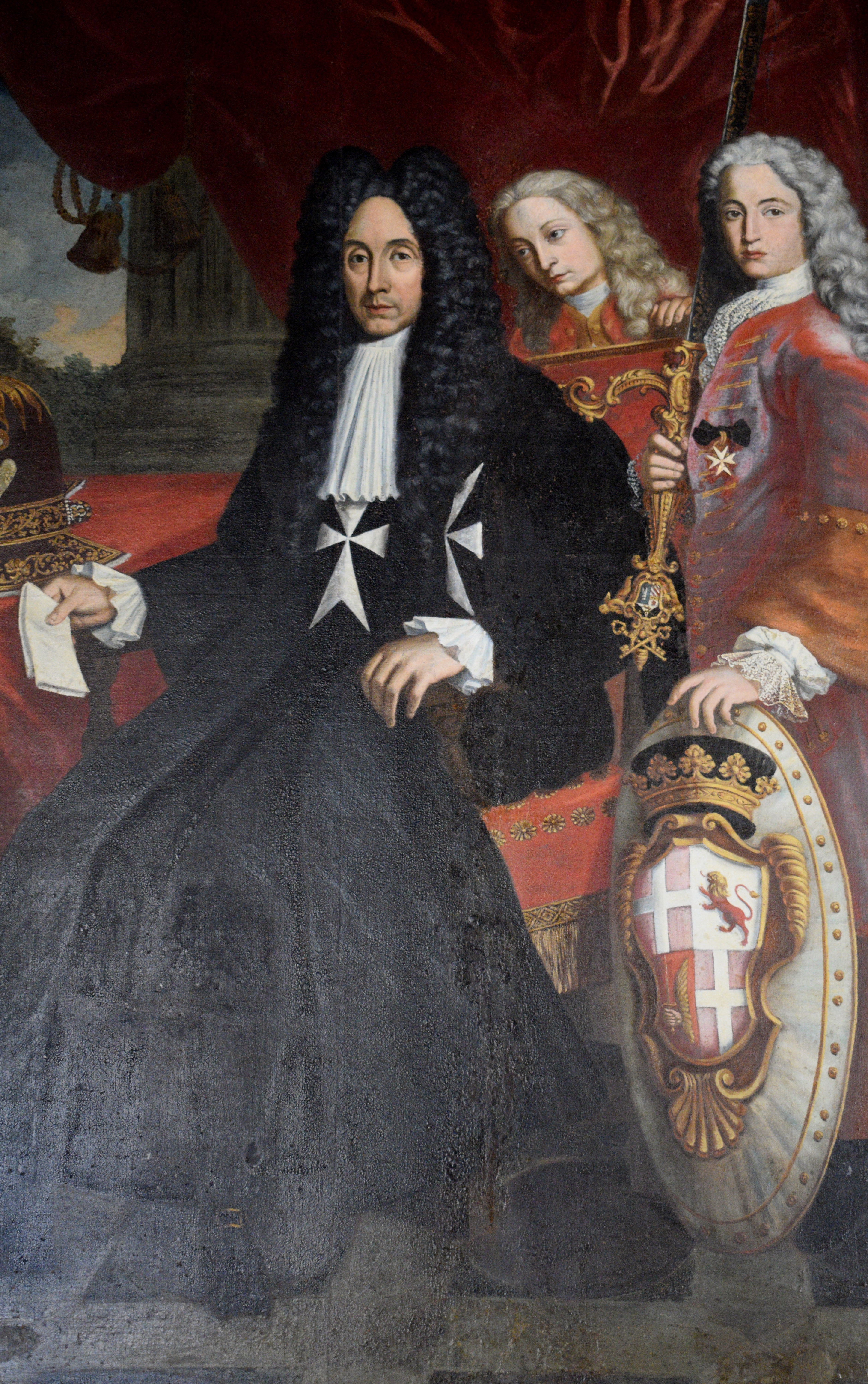 António Manoel de Vilhena. Malti: António Manoel de Vilhena.